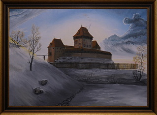 Kozí hrádek, olej na plátně 90x64 cm